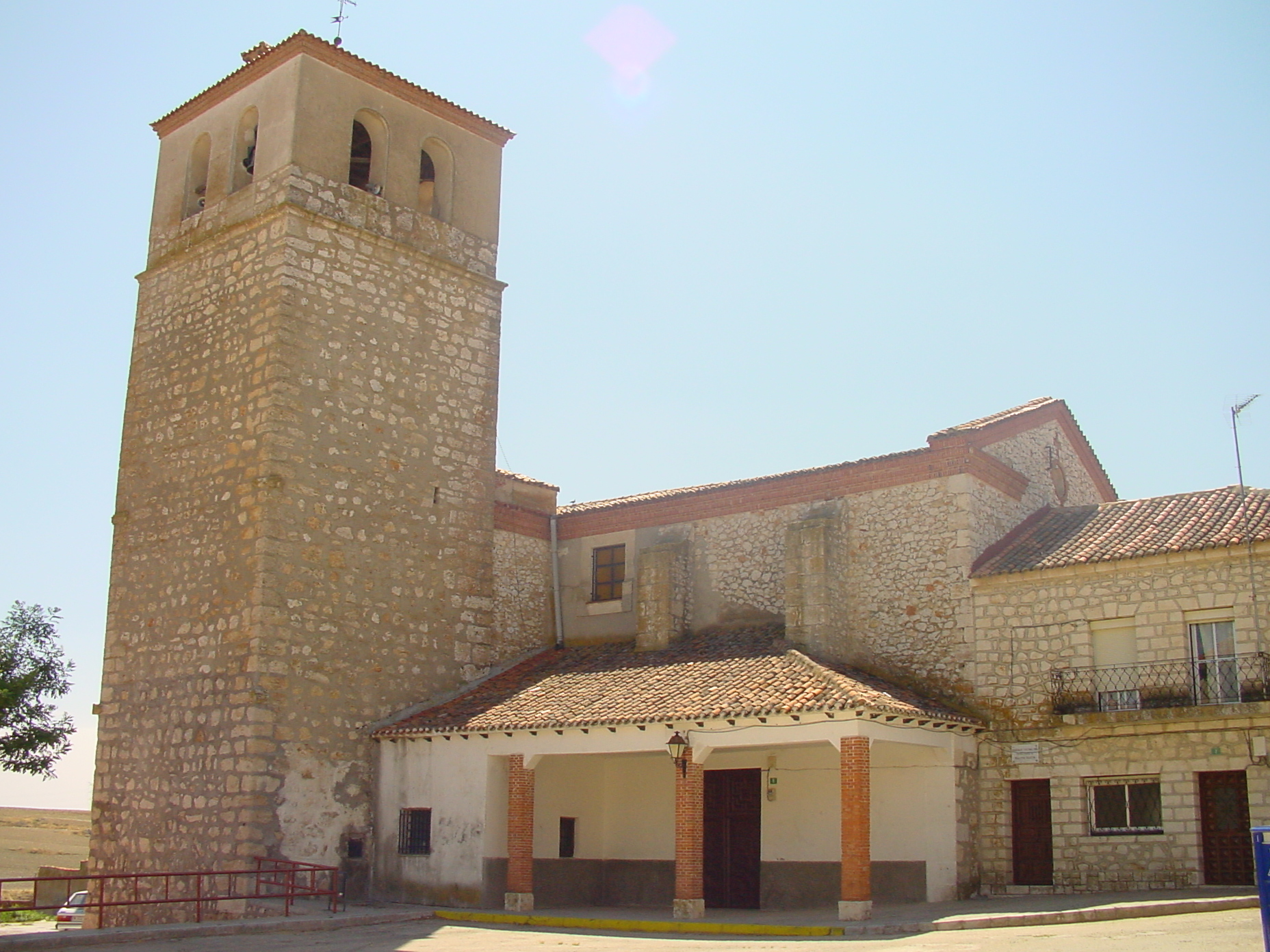 Iglesia y campanario en Corpa.